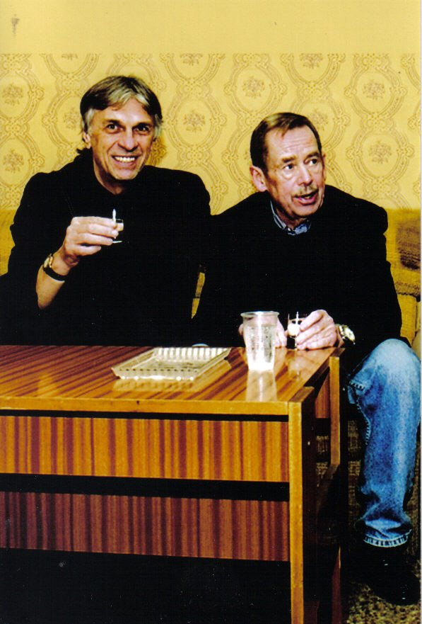 posledný pohárik ohnivej vody (marhuľovice) s Václavom Havlom, vo Zvolene počas krátkeho rozhovoru v roku 2008